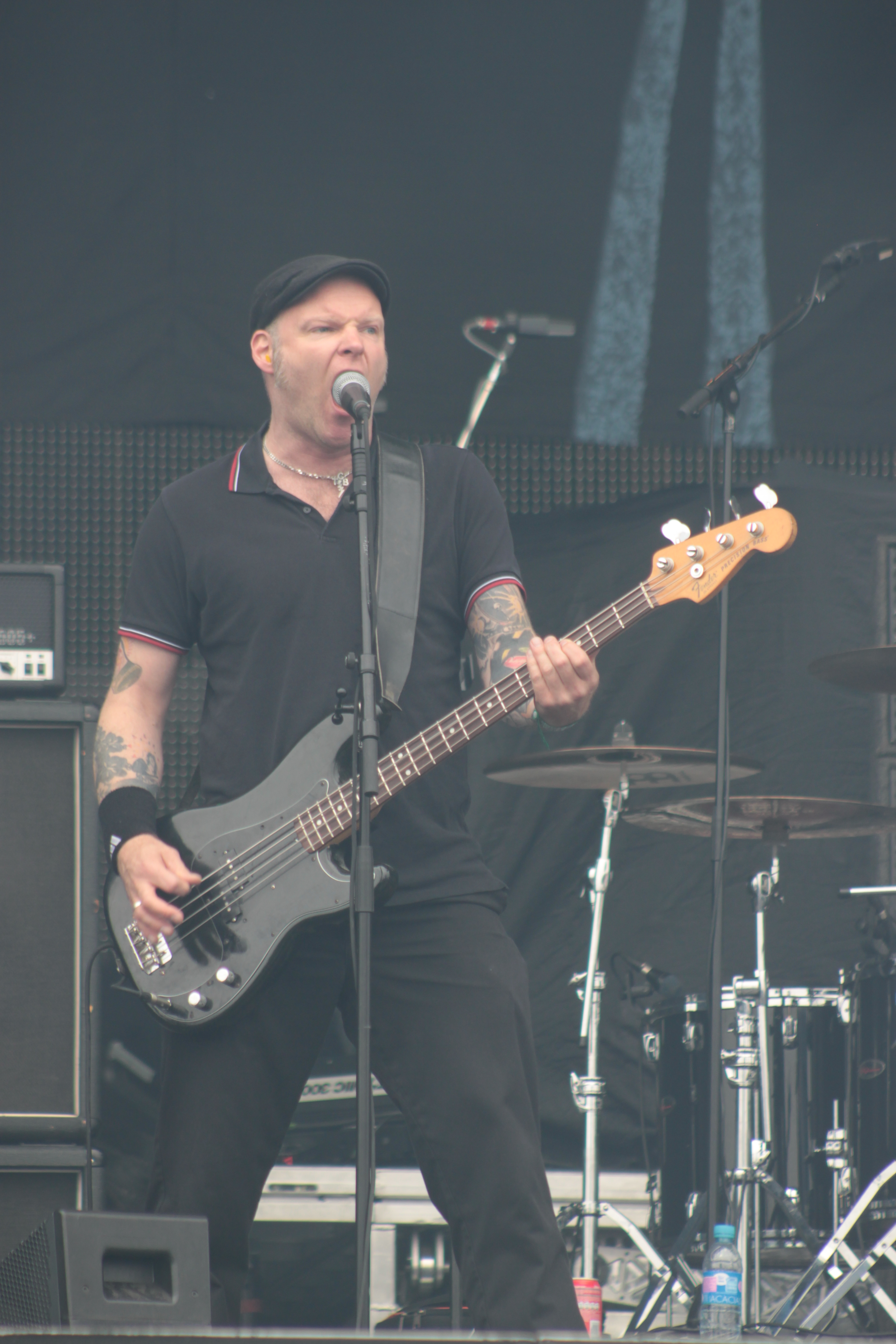 Espen Lien, Audrey Horne, Helfest 2013, Fr-44-Clisson.